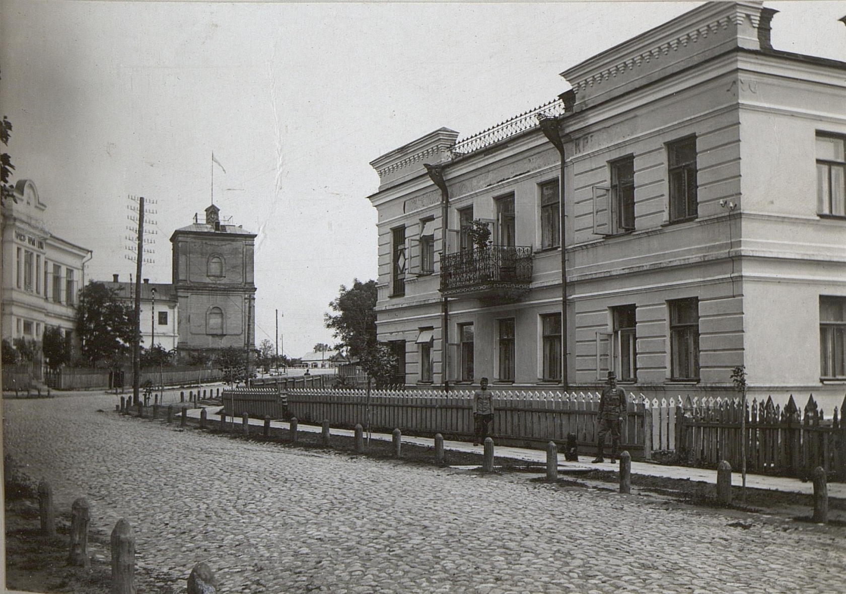 Expositur des 4.A.K. Wladimir Wolinsky.